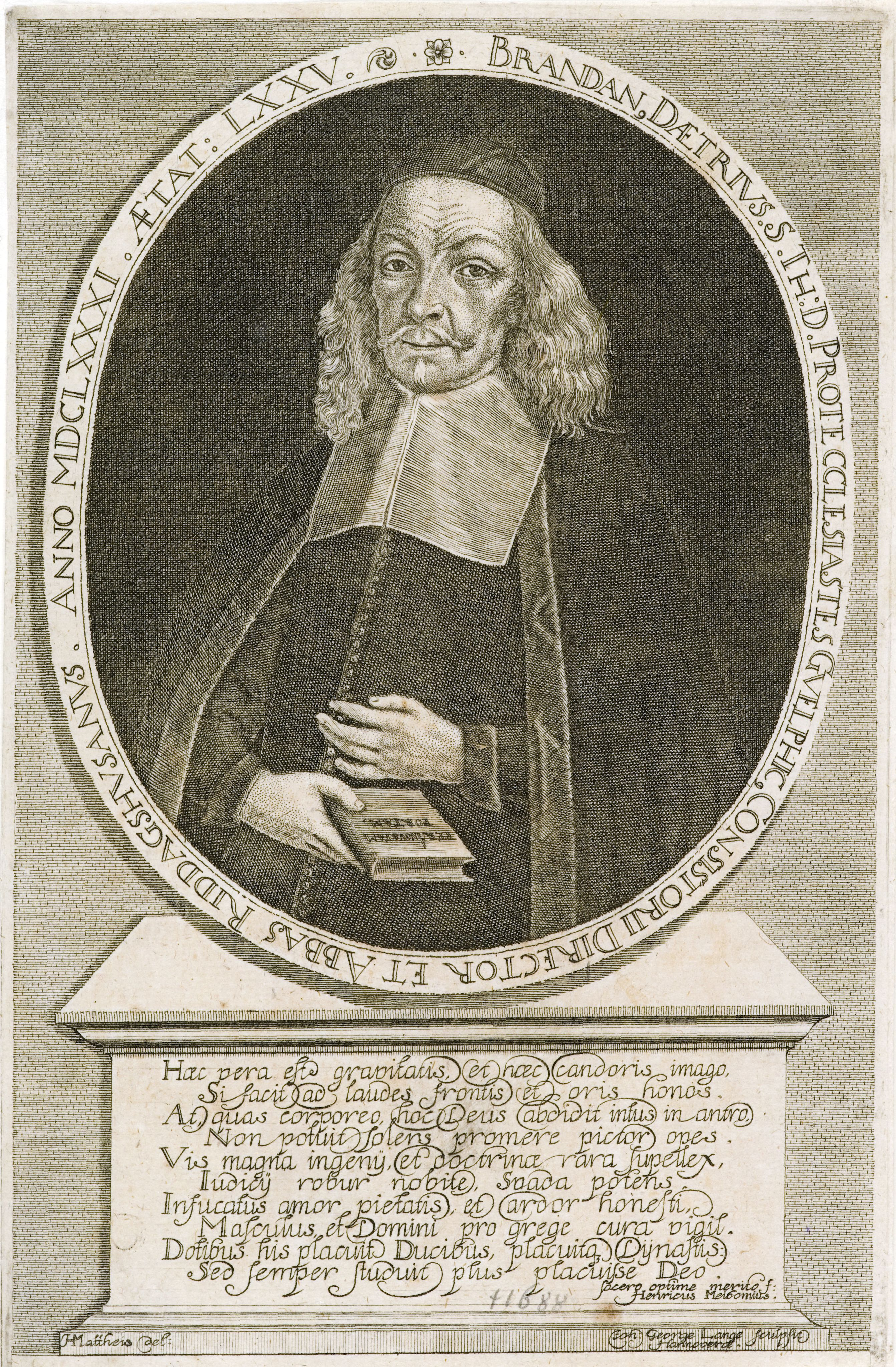 Bildnis von Brandanus Daetrius